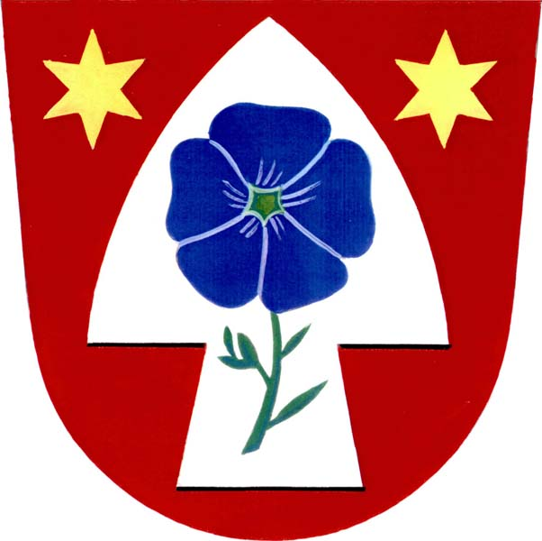 Znak obce Horní Smržov